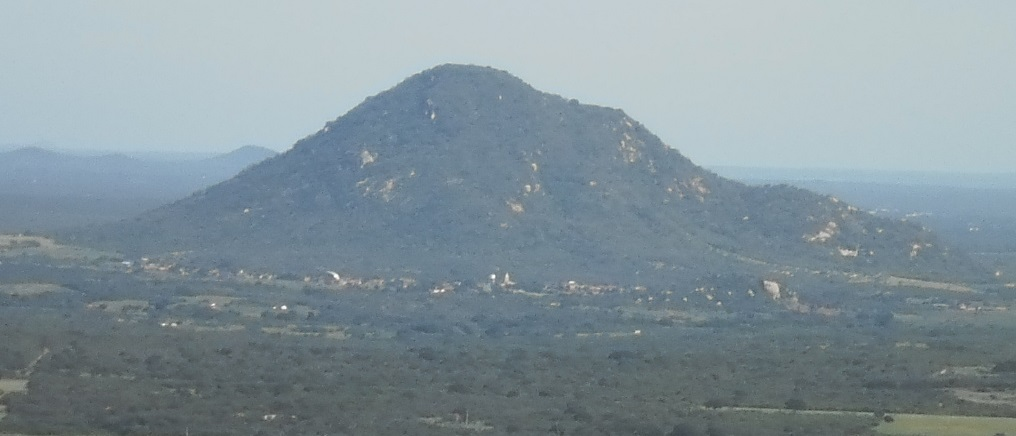 Rafael Godeiro visto da Serra do Lima, em Patu - Rio Grande do Norte. Em destaque a Serra Redonda.